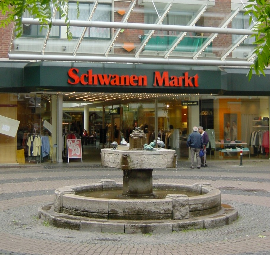 Description: Schwanenmarkt, Krefeld Date: 22.5.2006 Author: DER UNFASSBARE